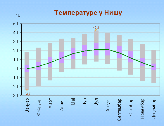 Temperature u Nišu